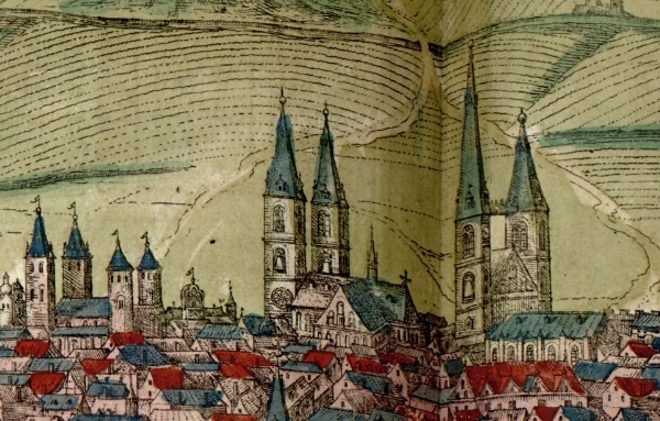 Braun/Hogenberg: Civitates orbis terrarum: Ausschnitt der Stadtansicht von Halberstadt: Liebfrauenkirche, Dom, St. Martini